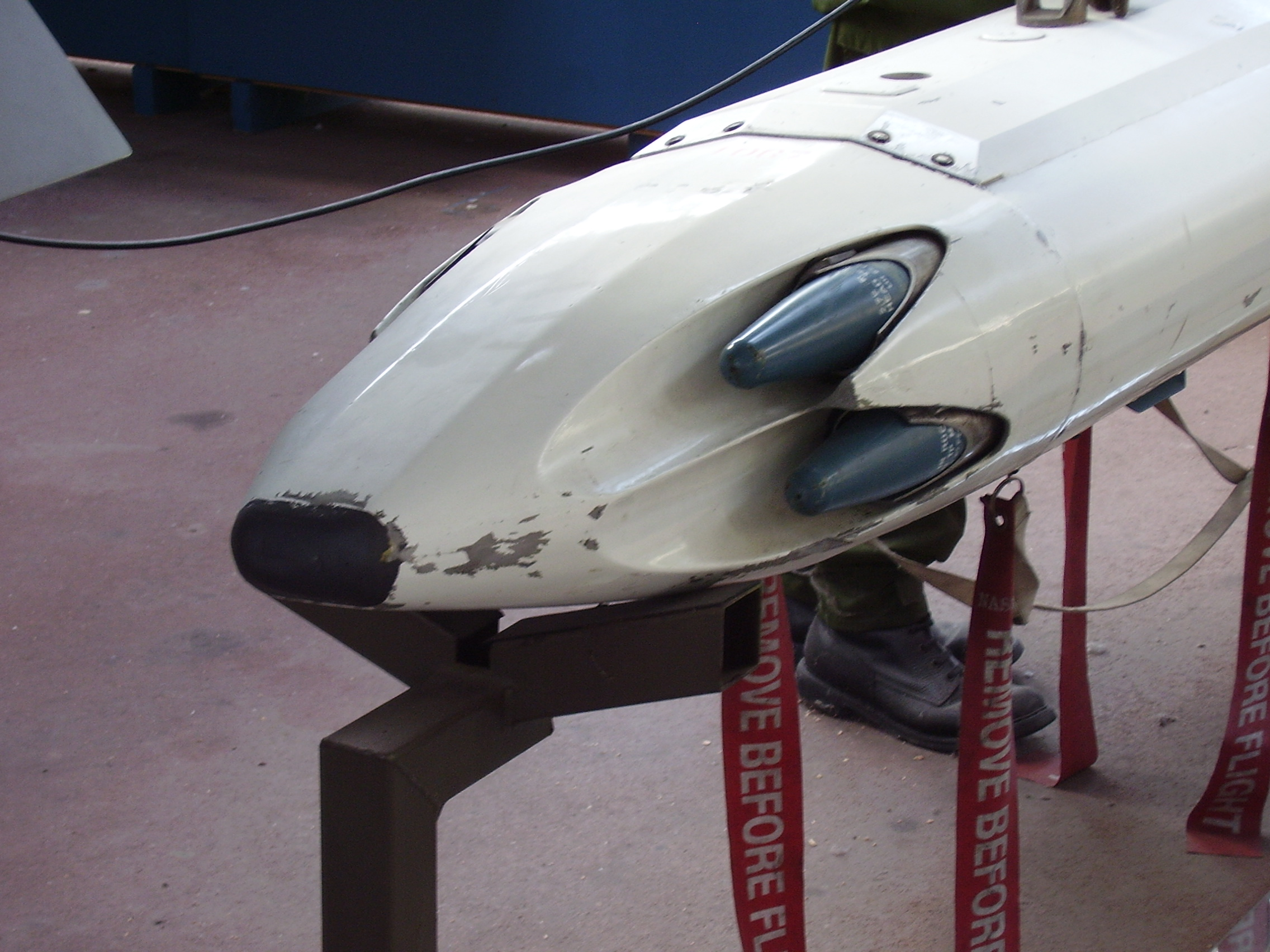 Royal Military Museum Brussels, Musée Royal de l'Armée, Koninklijk Museum van het Leger en de Krijgsgeschiedenis